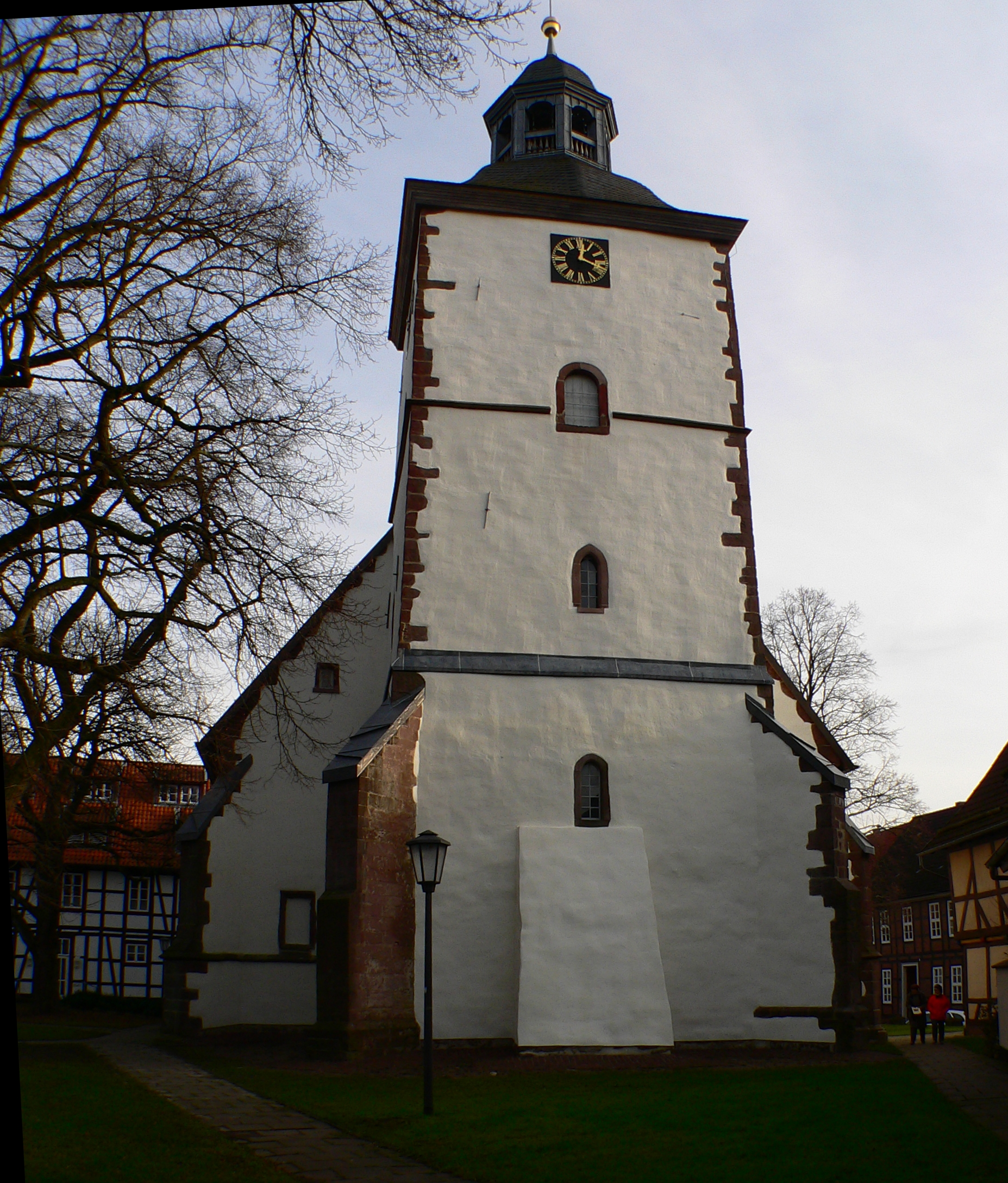 Evangelische Kirche St. Laurentius in Dassel, Niedersachsen, Deutschland - Mittelalterlicher Kirchturm (ehemals Wehrturm)